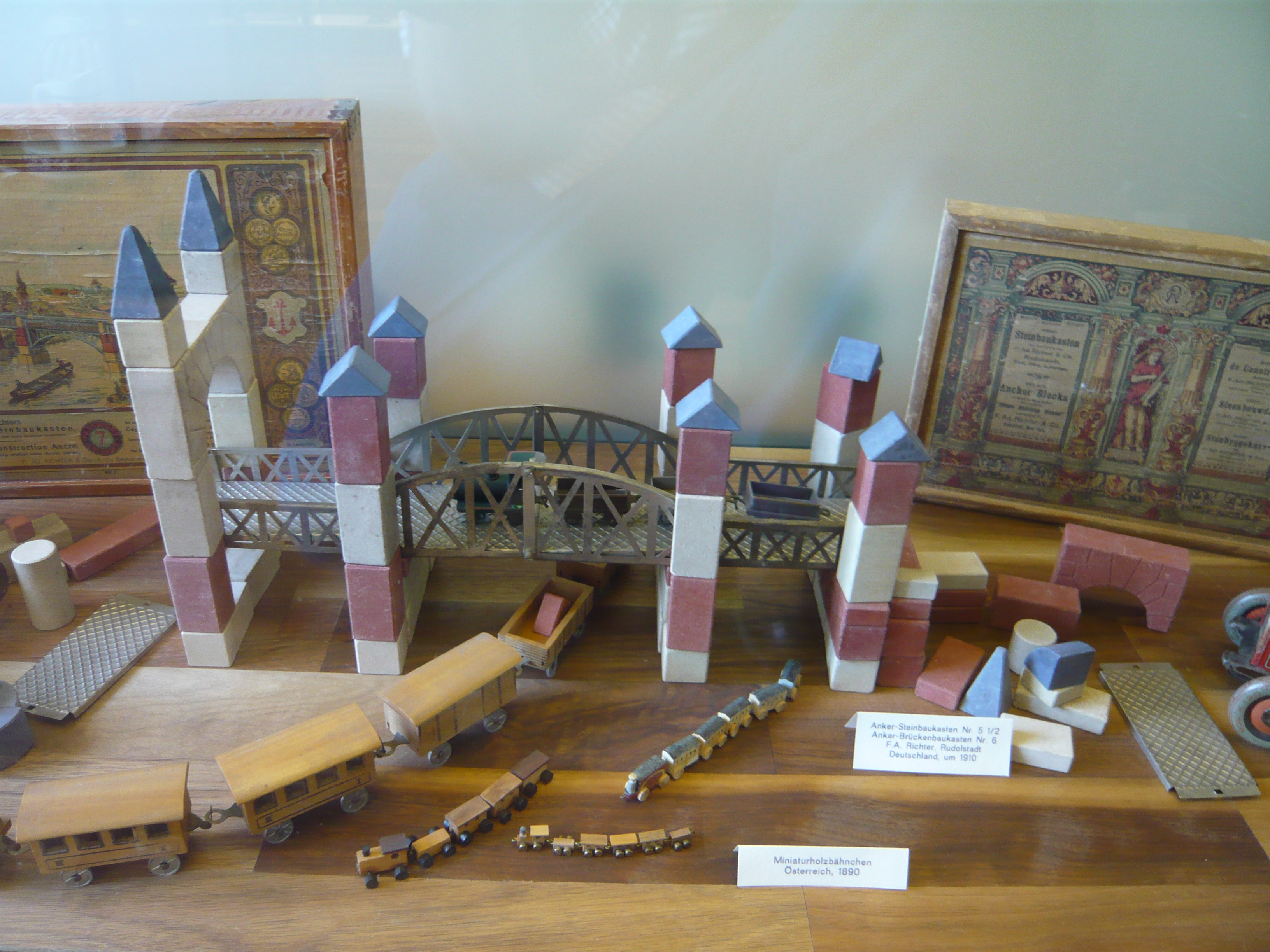 Zürcher Spielzeugmuseum Native nameZürcher SpielzeugmuseumLocationZürich, SwitzerlandCoordinates47° 22′ 23.16″ N, 8° 32′ 23.21″ E Established1956Web pageZürcher SpielzeugmuseumAuthority control : Q248517 VIAF: 155033967 LCCN: no2008003023 WorldCat institution QS:P195,Q248517